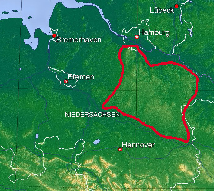 Vorlage